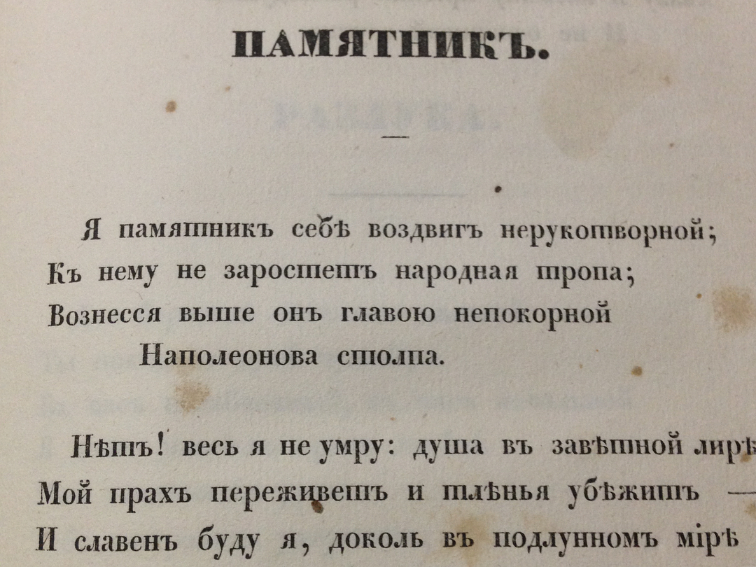 Текст "Памятника" в посмертном сборнике сочинений А.С. Пушкина